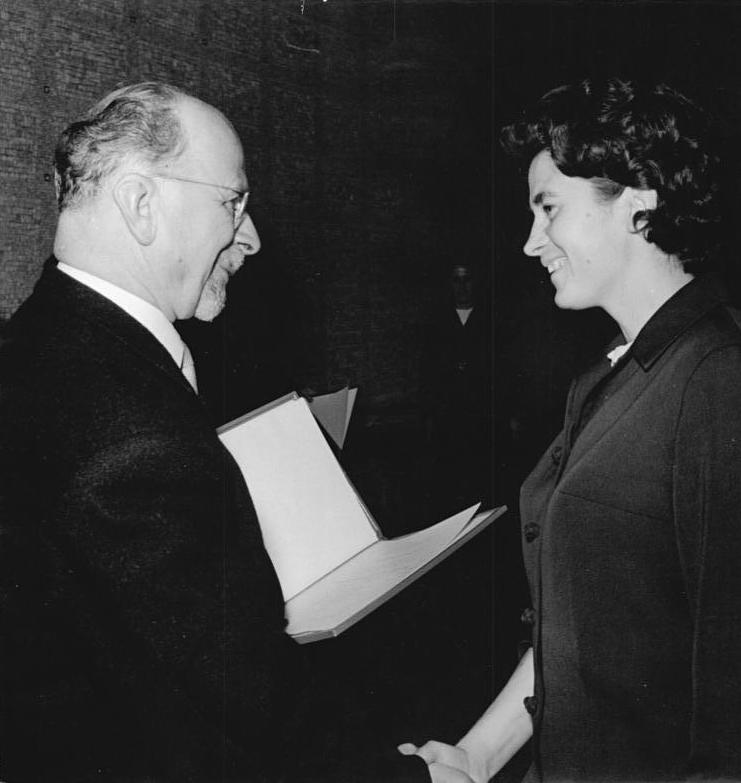 Zeentralbild Junge 5.10.1964 15 Jahre DDR - Hohe staatliche Auszeichnungen verliehen An hervorragende Persönlichkeiten und Kollektive, wurden aus Anlaß des 15. Jahrestages der Gründung der DDR am 5.10.1964, auf einem Festakt im neuen Amtssitz des Staatsrates, hohe staatliche Auszeichnungen verliehen. UBz: Der Vorsitzende des Staatsrates, Walter Ulbricht, zeichnet die Schriftstellerin Christa Wolf, mit dem Nationalpreis III. Klasse, für Kunst und Literatur aus.